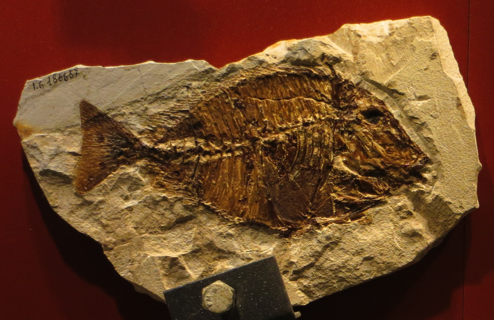 Fossil of Tylerichthys- Museo dei Fossili di Bolca